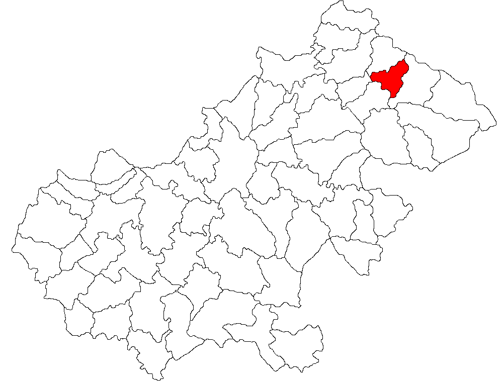 Categorie:Hărţi ale judeţului Satu Mare